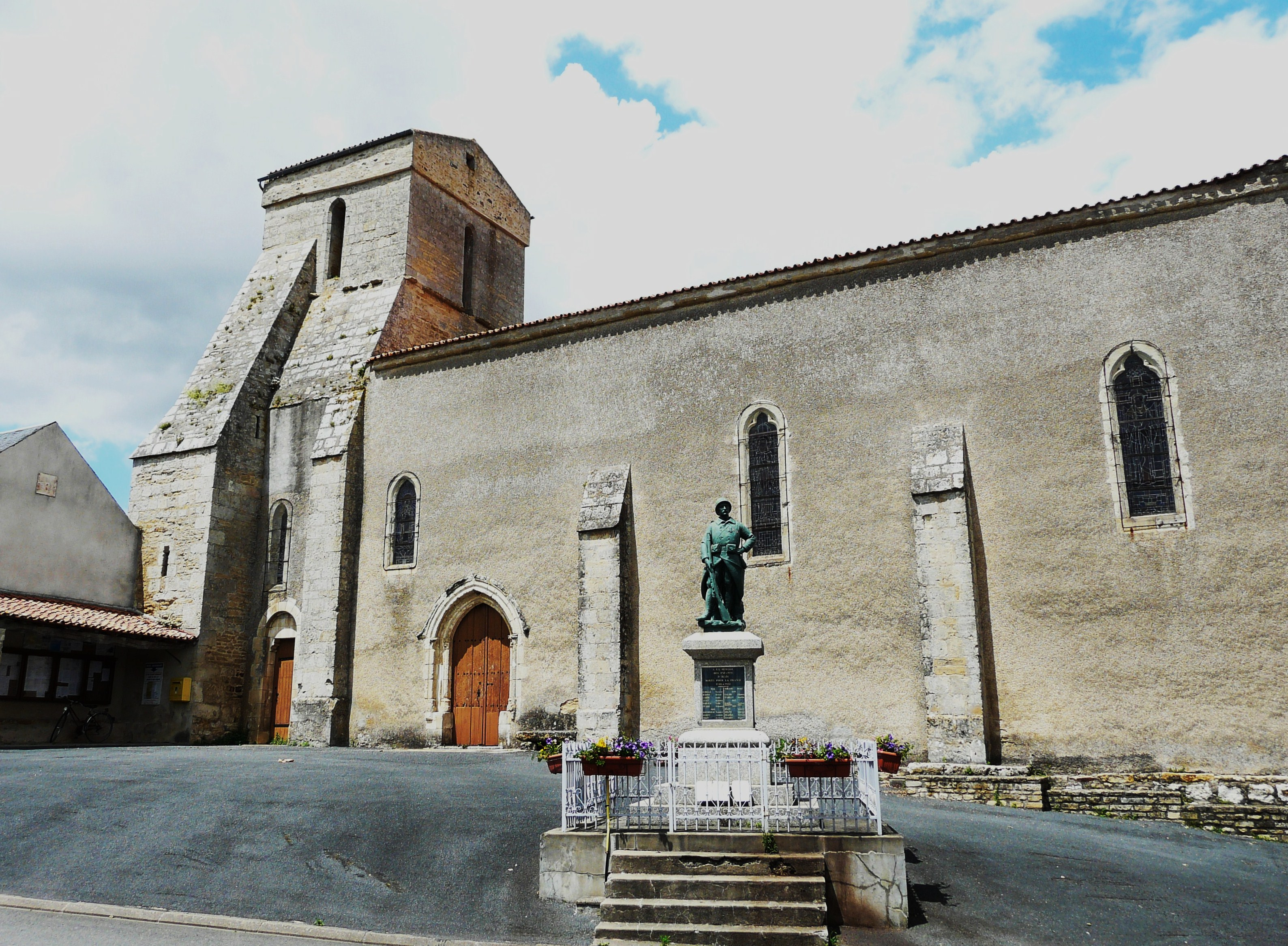 L'église d'Irais